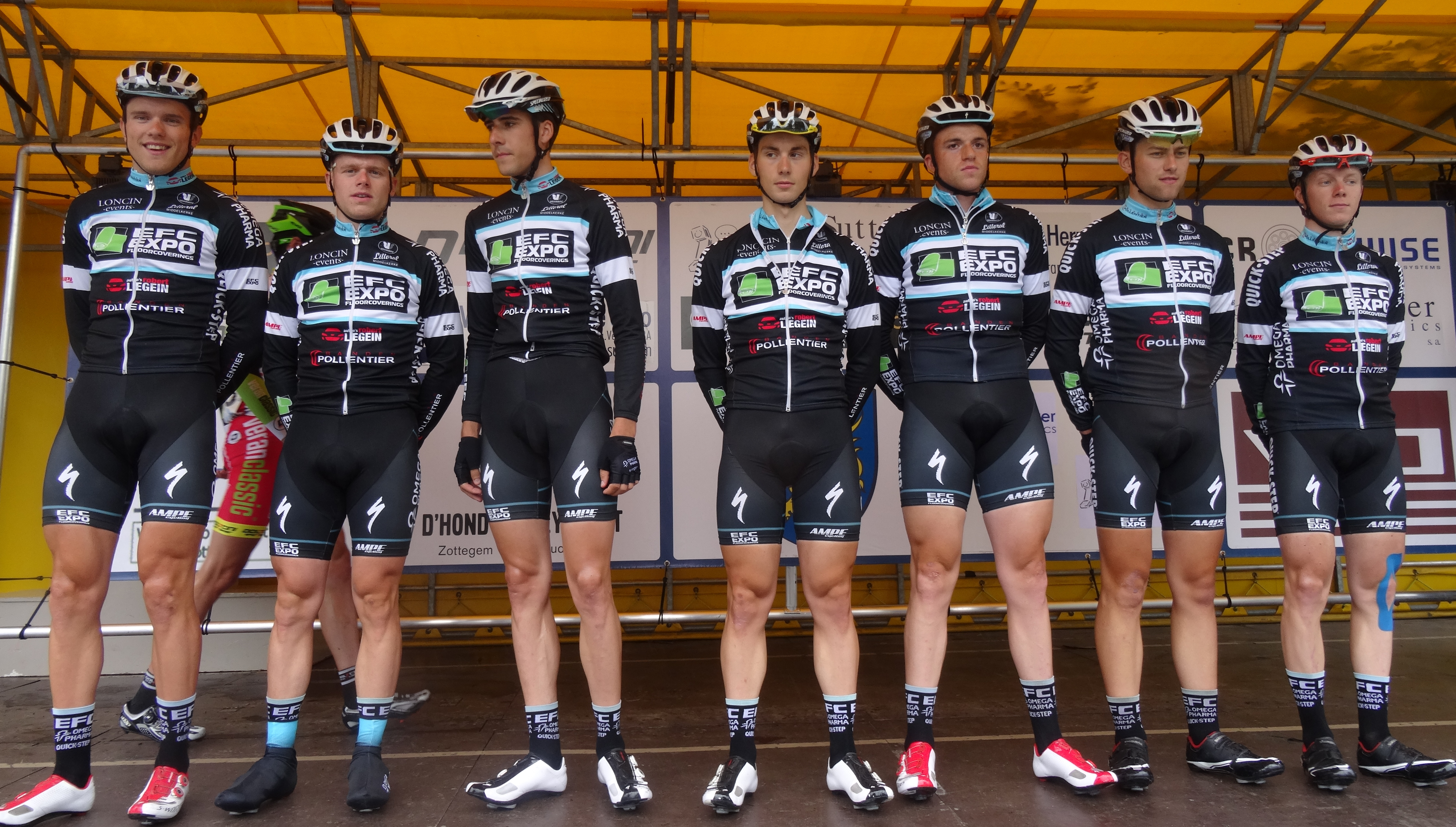 Reportage photographique réalisé le samedi 5 juillet à l'occasion du départ et de l'arrivée du Circuit Het Nieuwsblad espoirs 2014 à Grotenberge (Zottegem), Belgique.